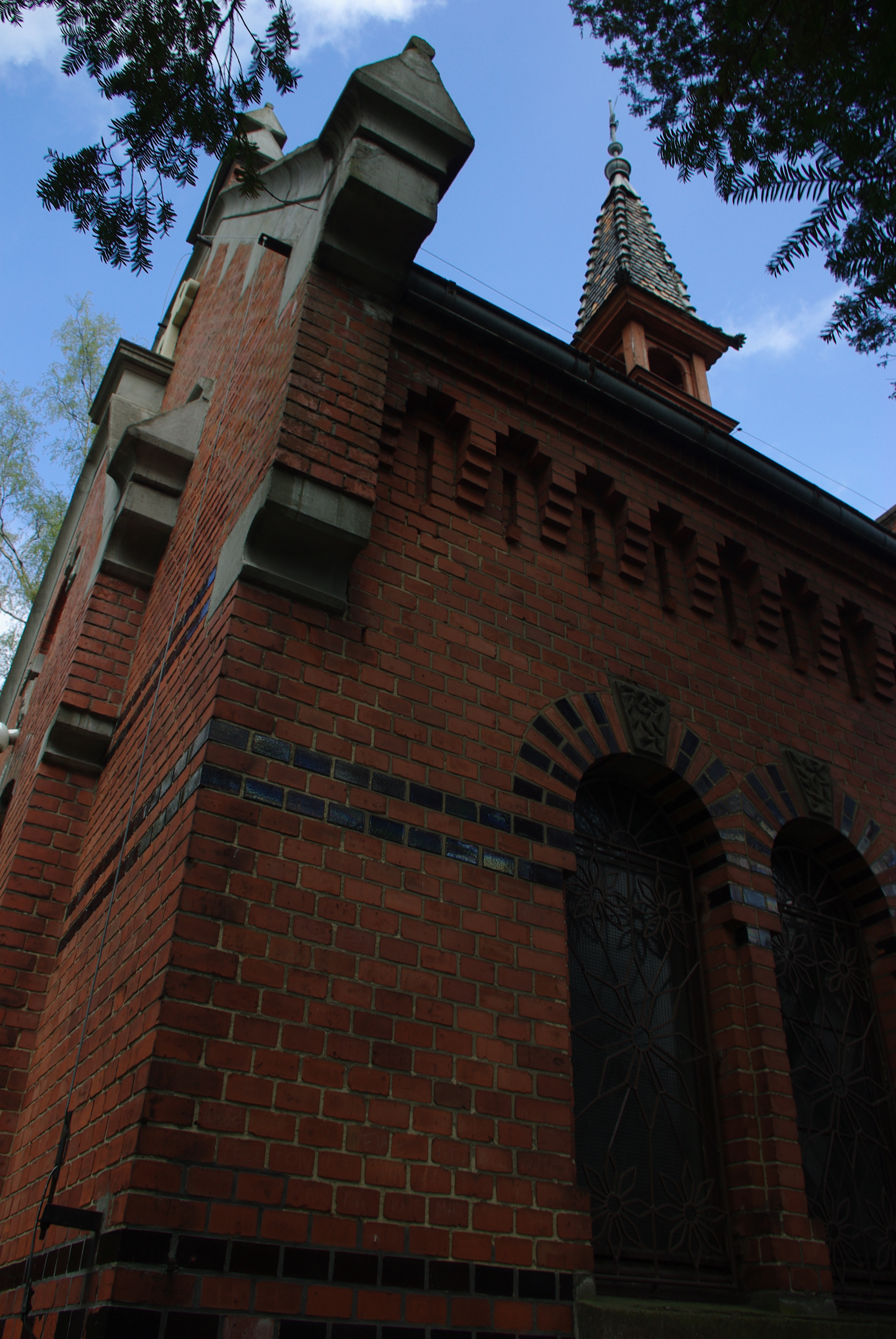 Starogard Gdański, kaplica z kostnicą, 1894-1920